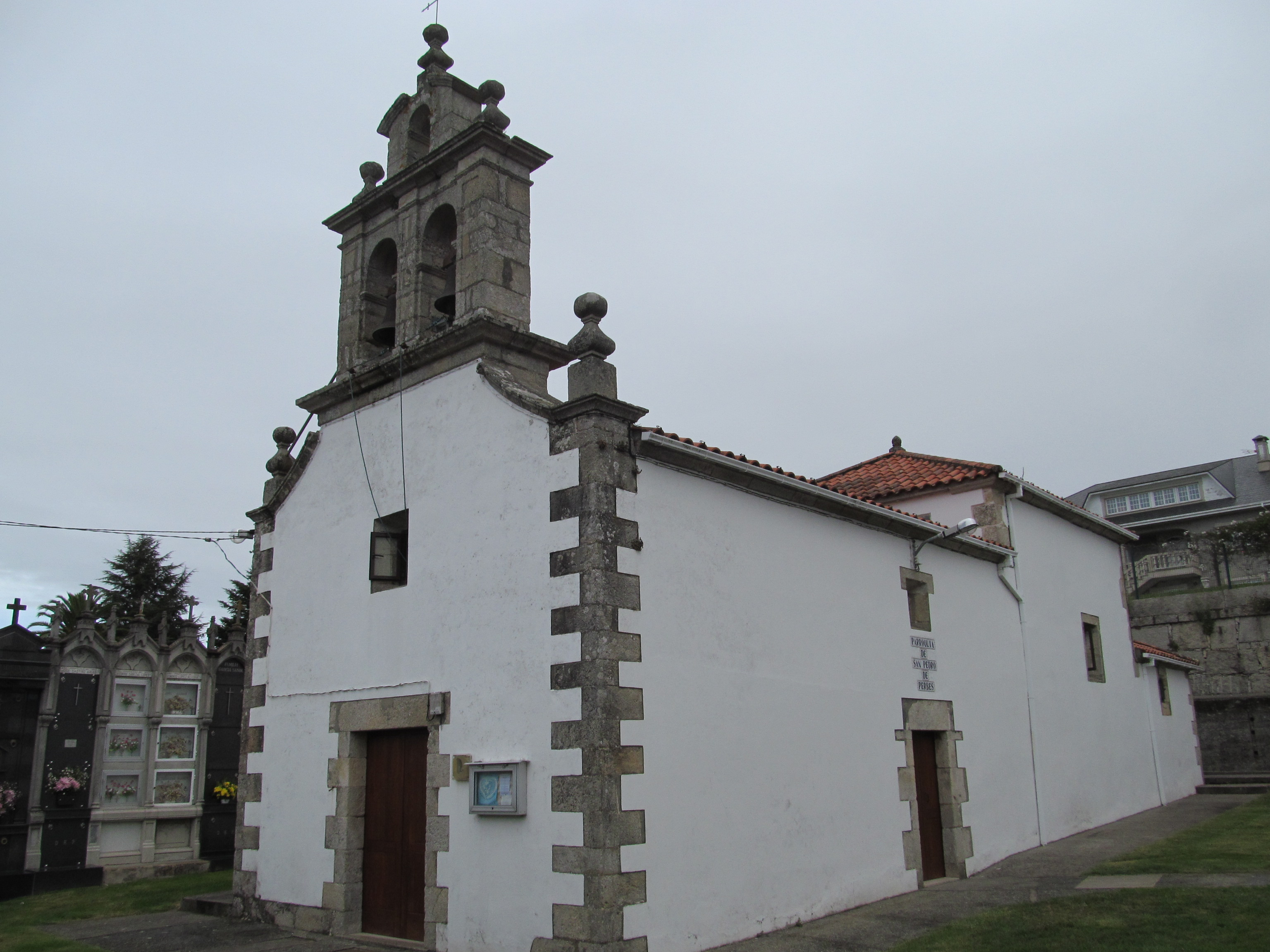 Iglesia parroquial de San Pedro de Perbes, en Miño, comarca de Betanzos, Galicia (España).